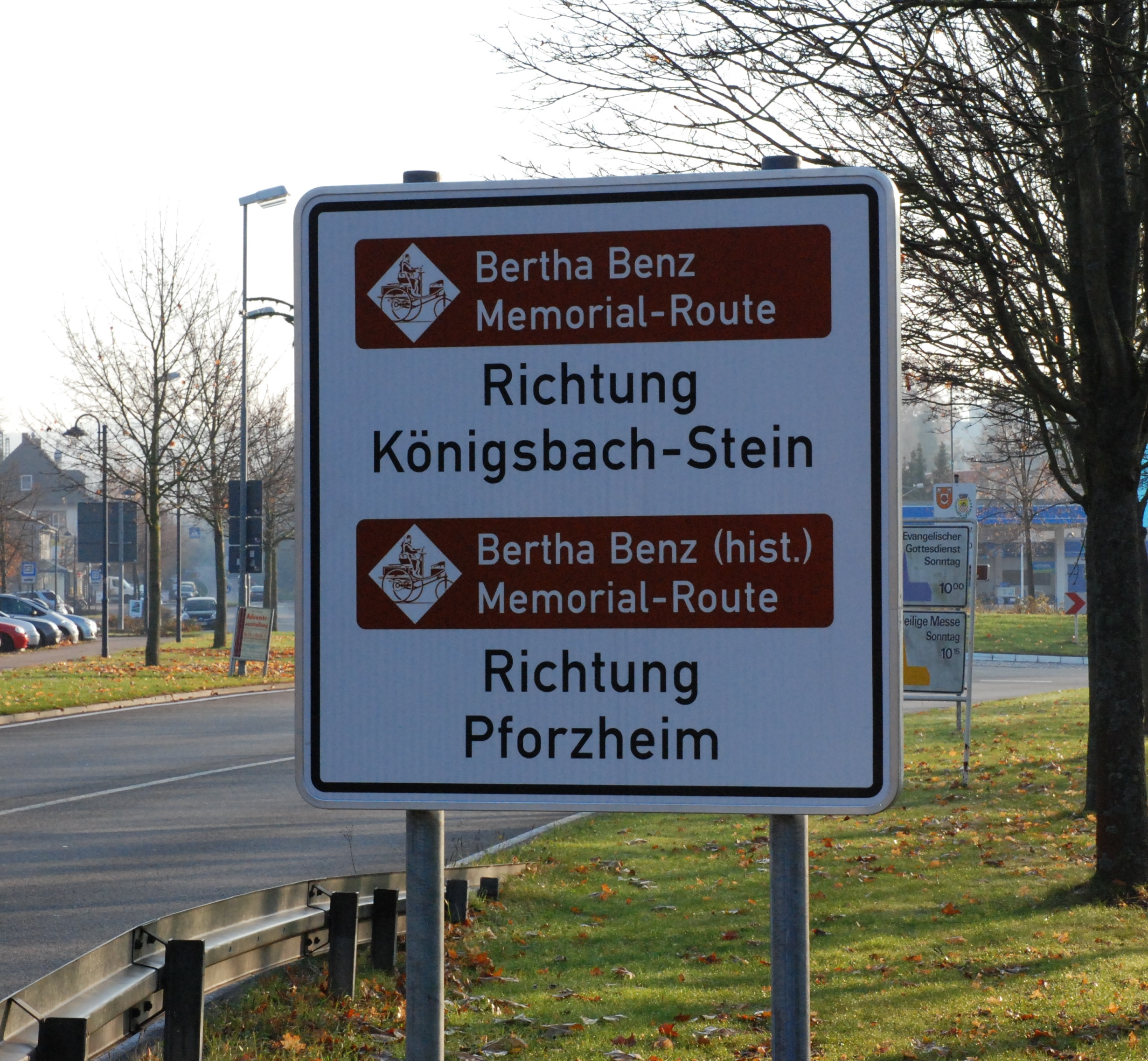 Dieses Schild befindet sich an der B10 am Ortseingang von Wilferdingen aus Richtung Kleinsteinbach. Ab dieser Stelle verlässt die Bertha Benz Memorial Route die von Bertha Benz befahrene historische Route, die in Richtung Pforzheim weiter verläuft. Die historische Route ist als "Bertha Benz Memorial Route (hist.)" bis Pforzheim ausgeschildert.